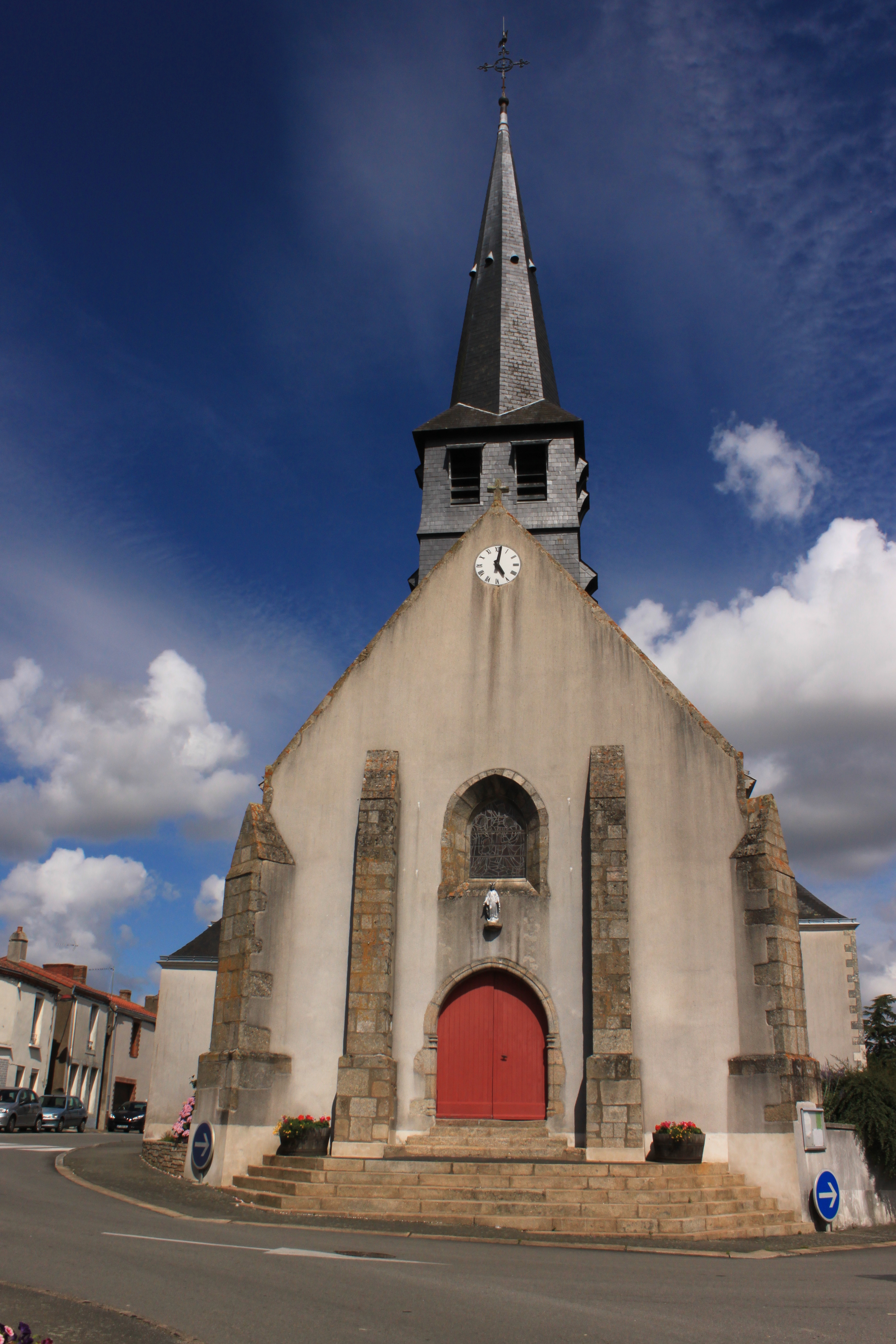 Église Saint-Rogatien, XIV°-XIX°, Maisdon-sur-Sèvre.